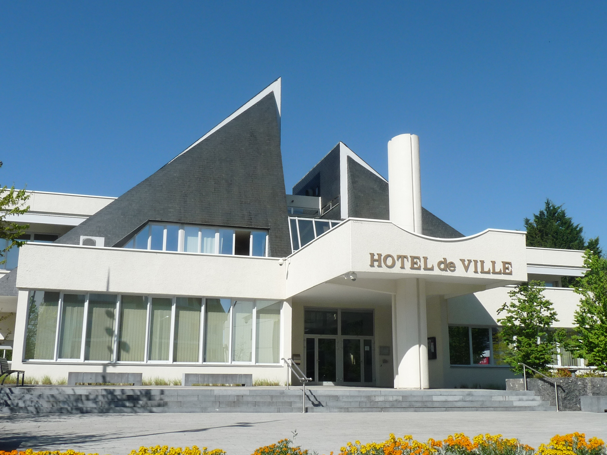 Saint Doulchard